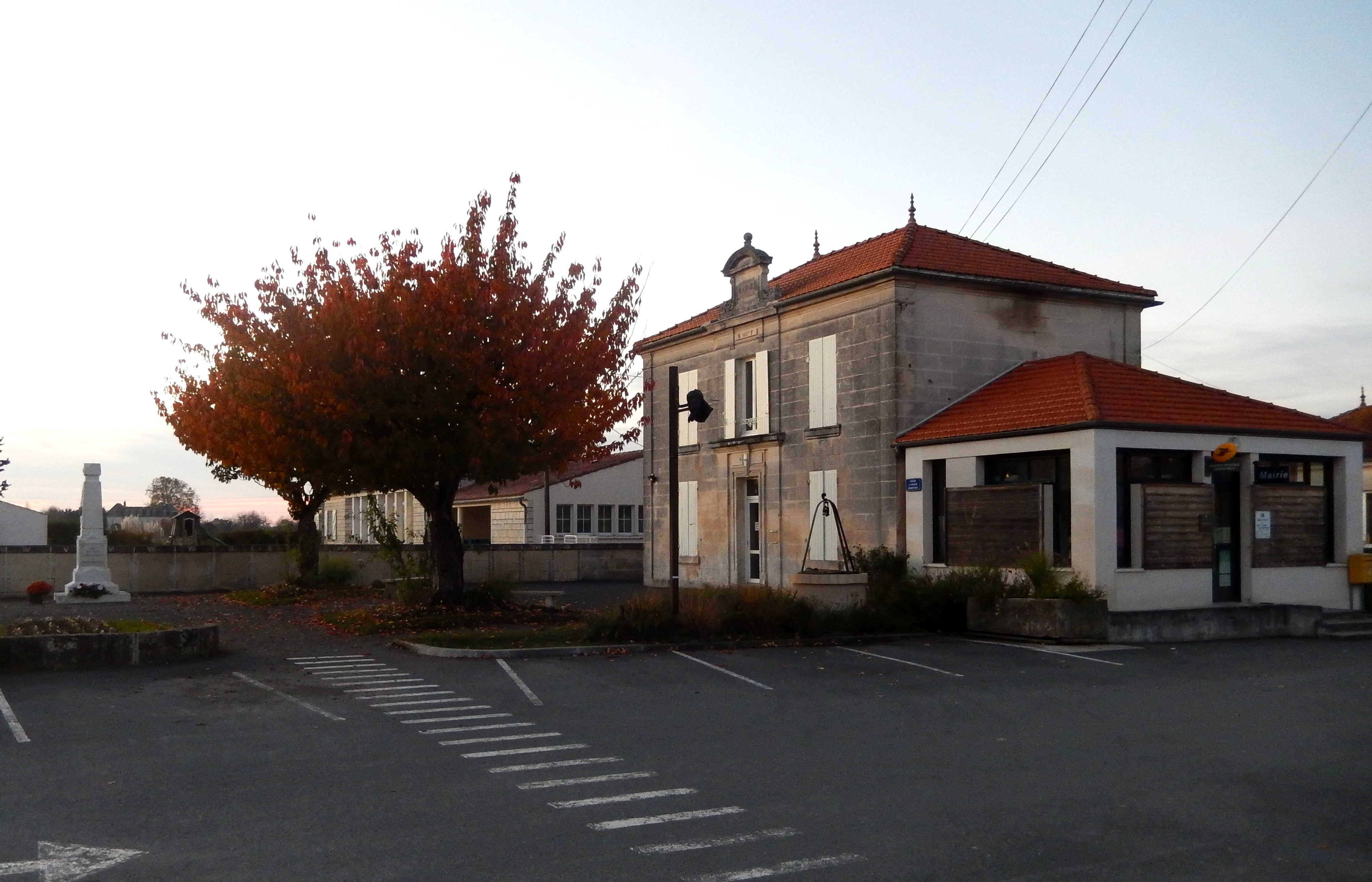 (Commune de Saint-Sever-de-Saintonge, Charente-Maritime, France.) La mairie de la commune.